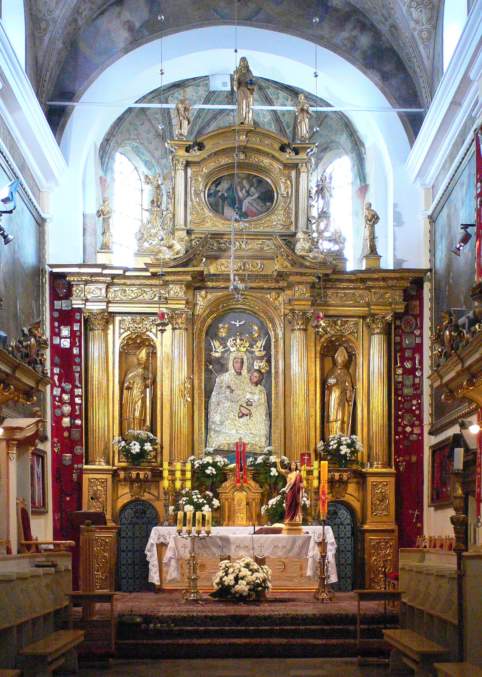 Kościół Zwiastowania Najświętszej Maryi Panny w Czerwińsku nad Wisłą - ołtarz.